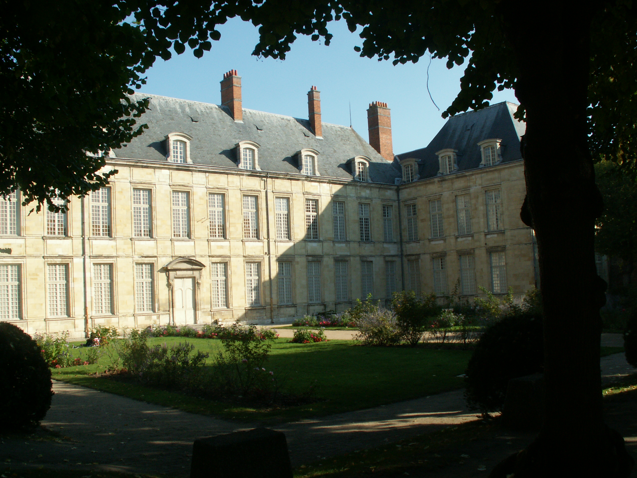 This building is en partie classé, en partie inscrit au titre des Monuments Historiques. .